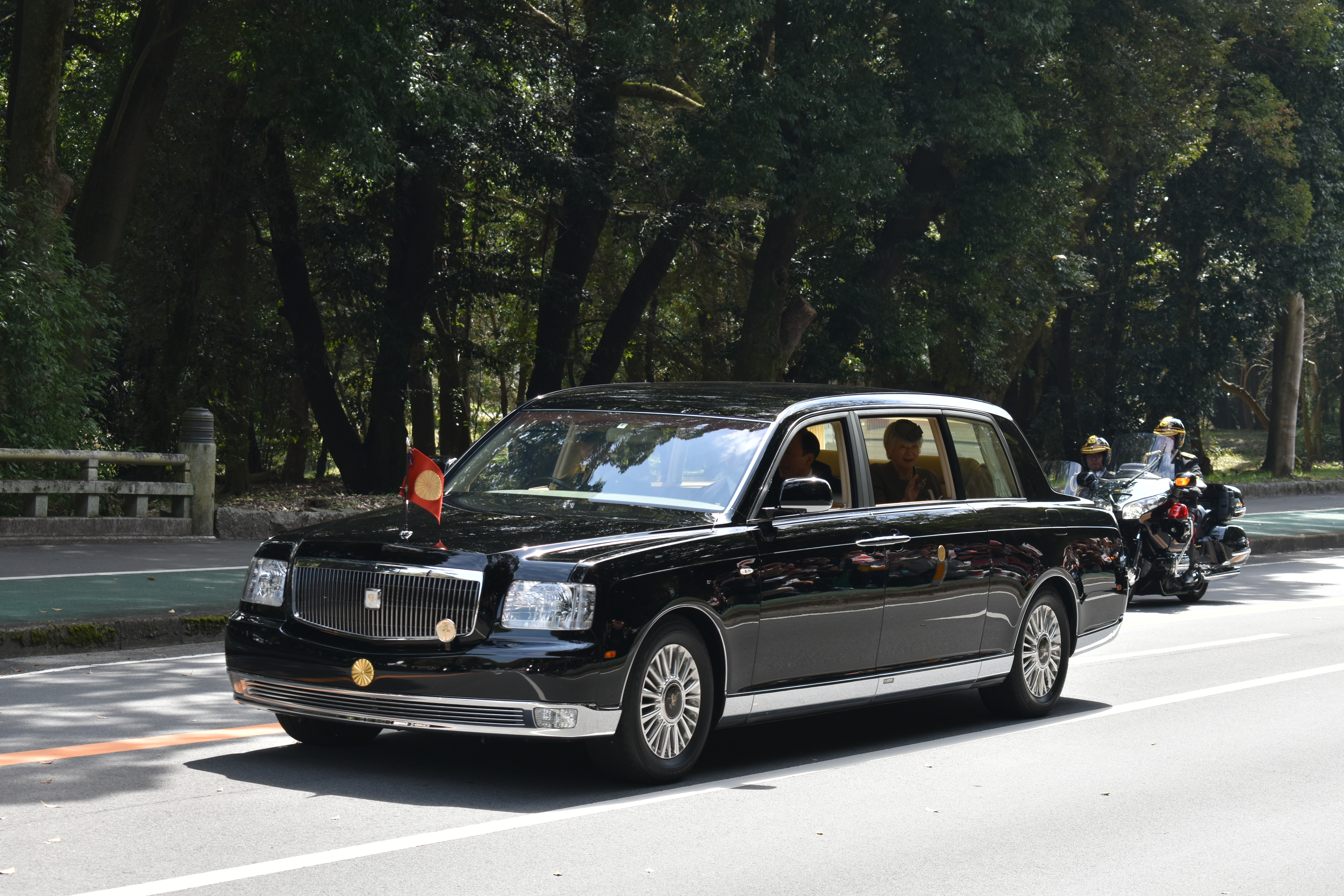 ２０１９年（平成３１年）３月２６日 奈良県橿原市の神武天皇陵へ向かう御料車。後部座席に天皇・皇后陛下が座る。